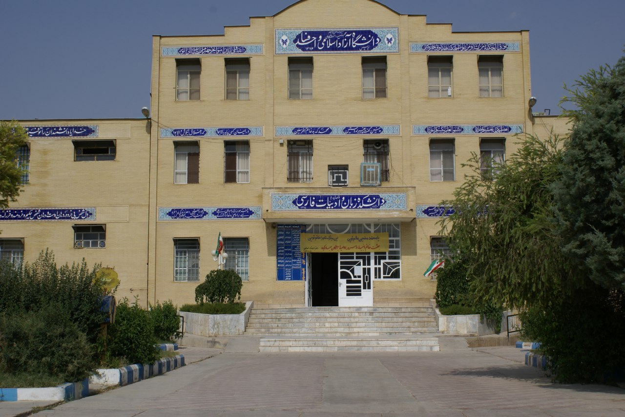 دانشکده زبان و ادبیات فارسی دانشگاه آزاد اسلامی واحد فسا